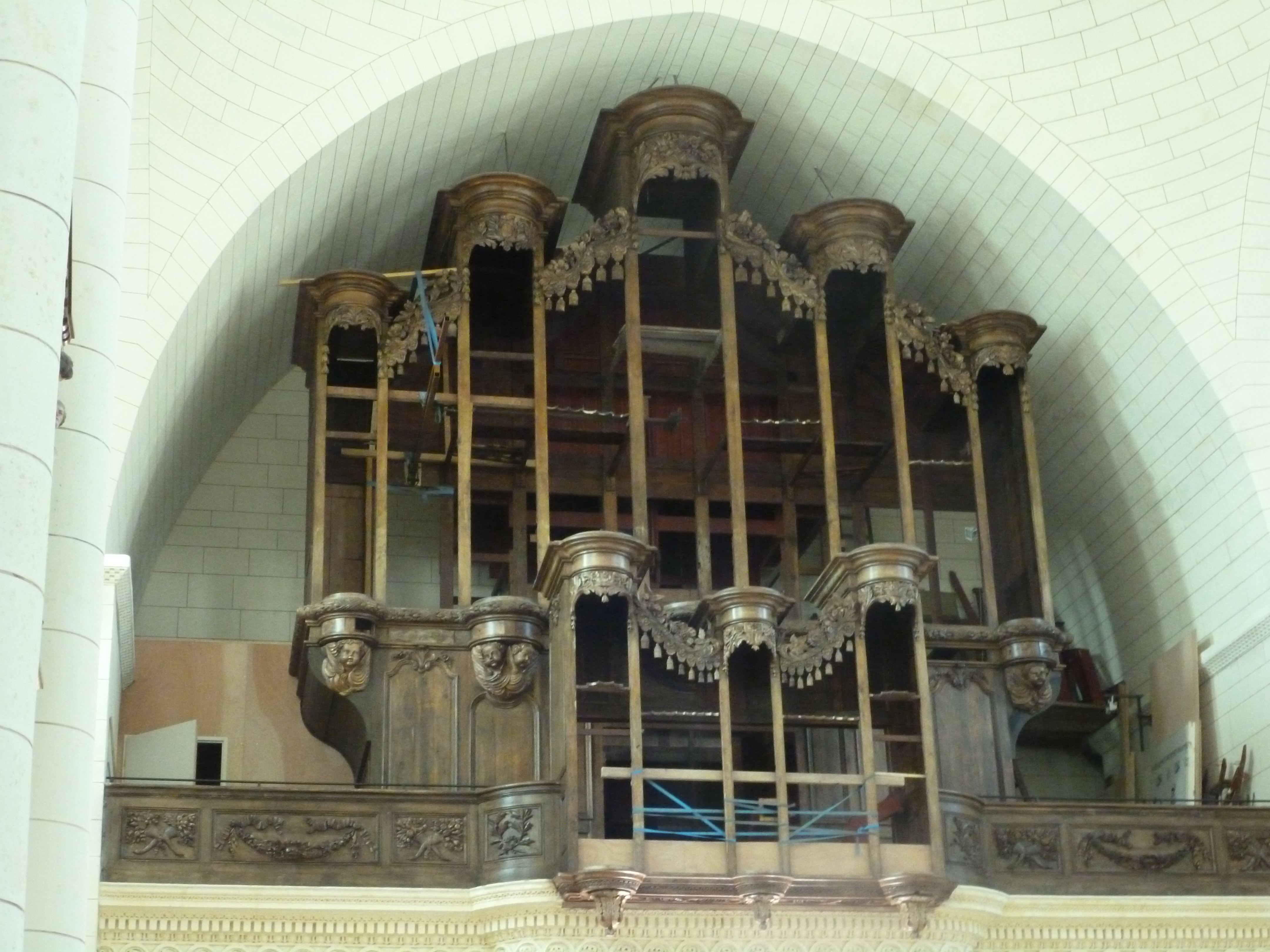 Orgue de tribune dépourvu de ses tuyaux. Cathédrale d’Angoulême (Charente, Poitou-Charentes, France).